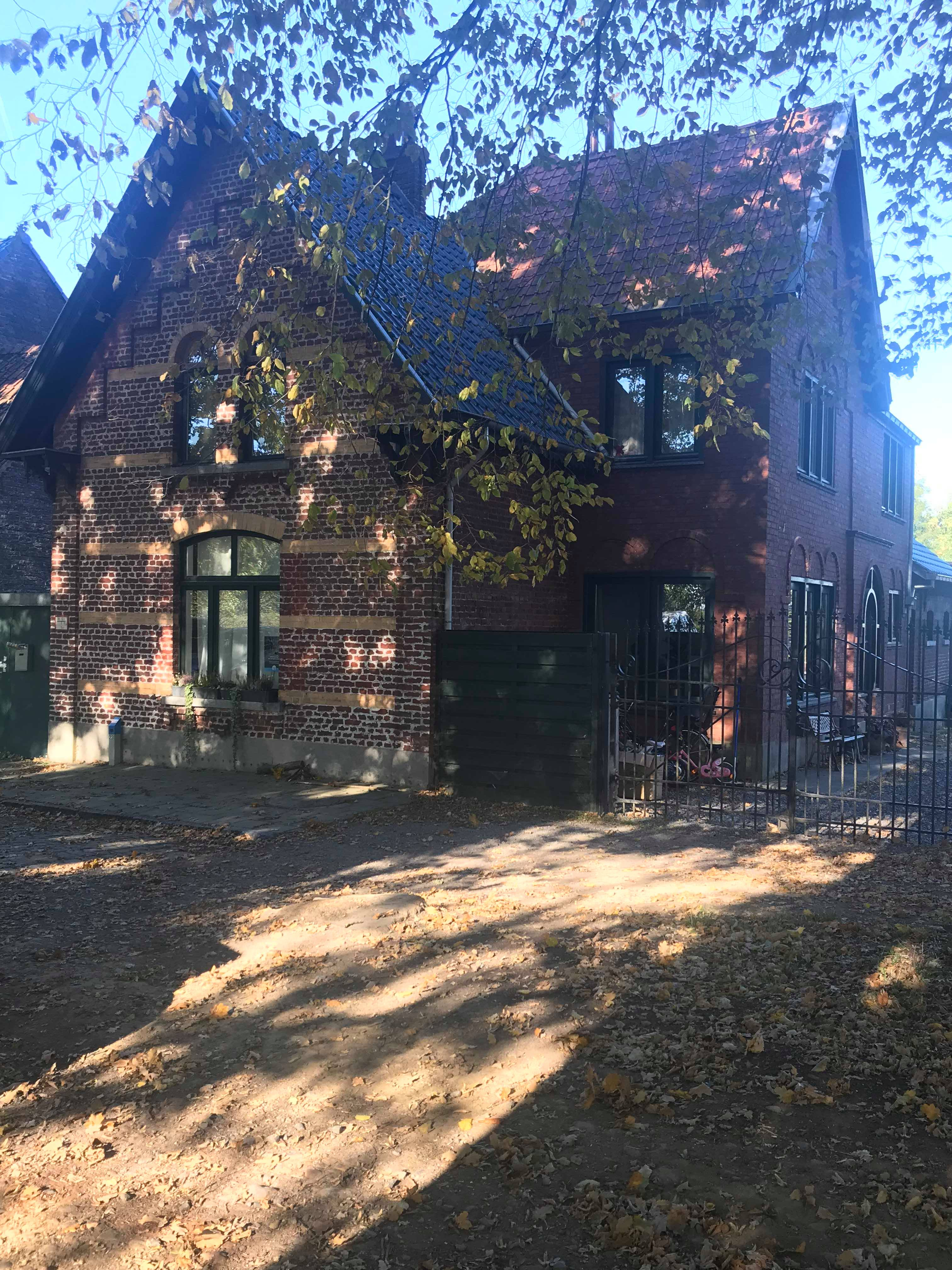 Kasteeldreef 5, 9550 Herzele-Personeelswoning horend bij kasteel Du Parc-Locmaria